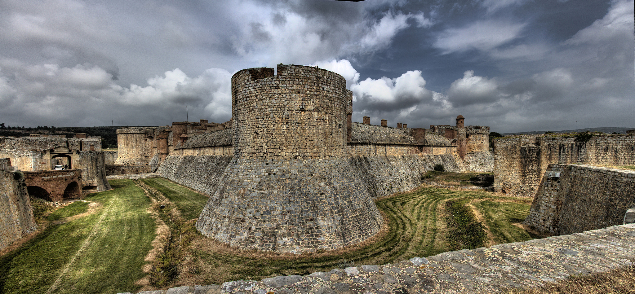 Panoràmica del Castell de Salses realitzada el 22/04/2011. Codi monument: PA00104129